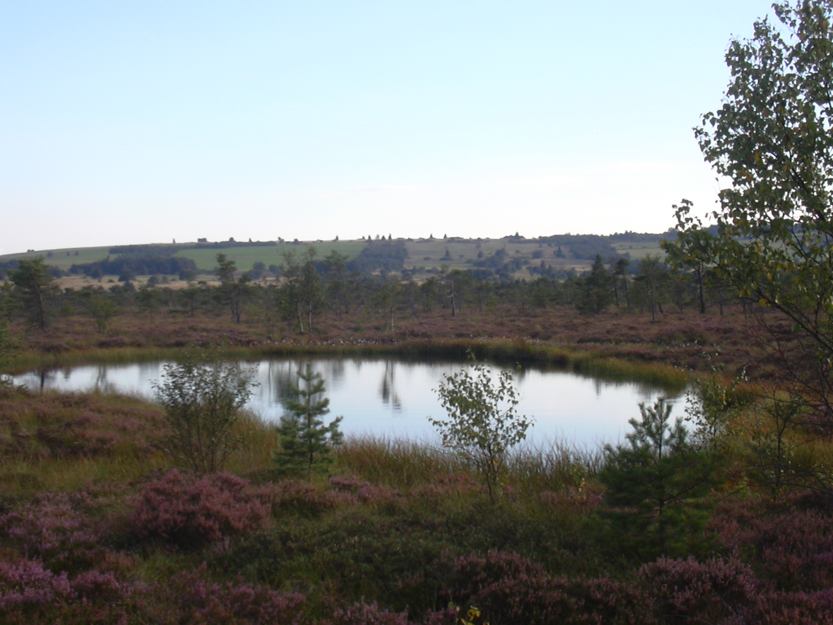 Black Moor, Rhön, Bavaria/Germany